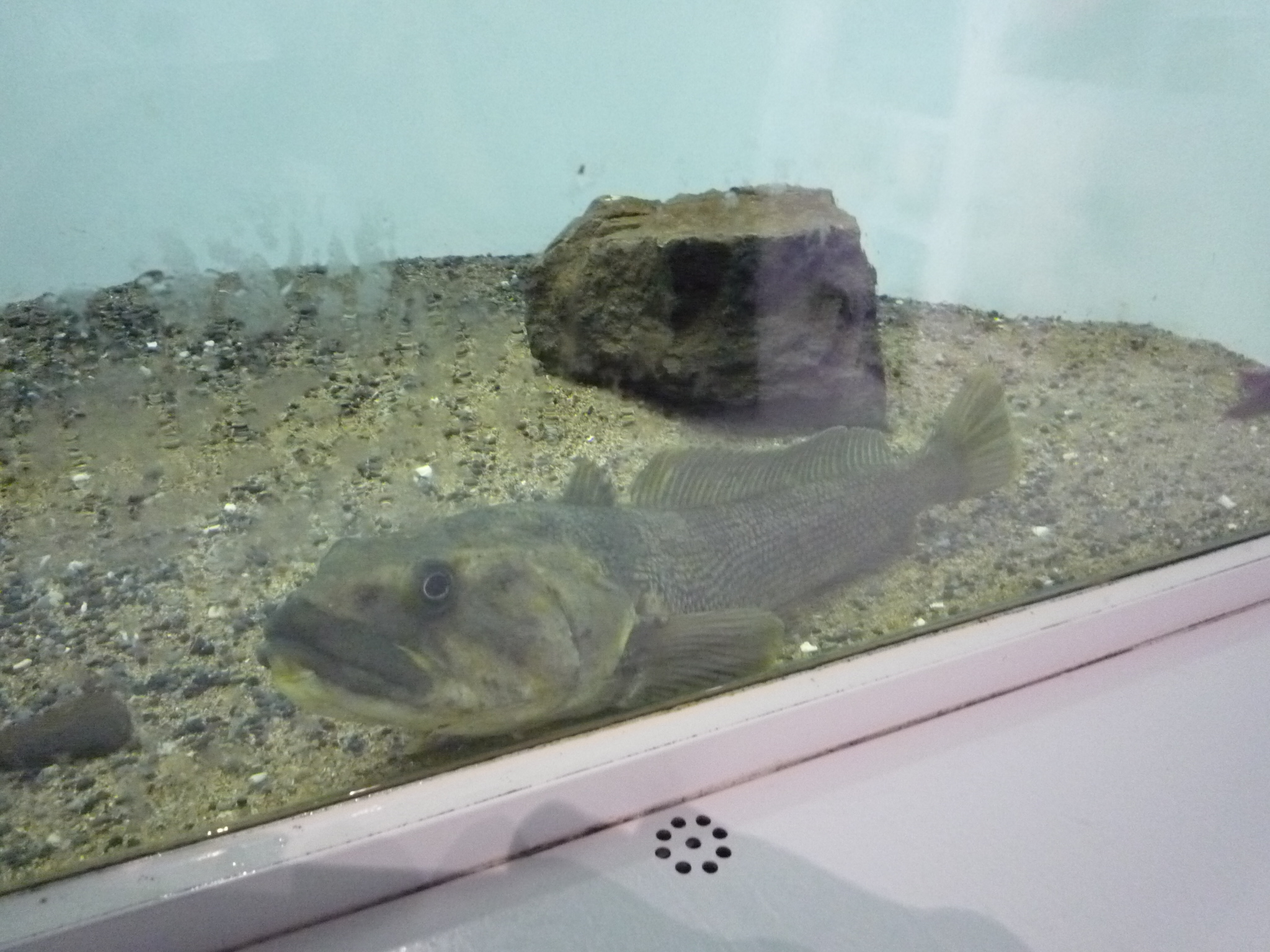 葛西臨海水族園にて